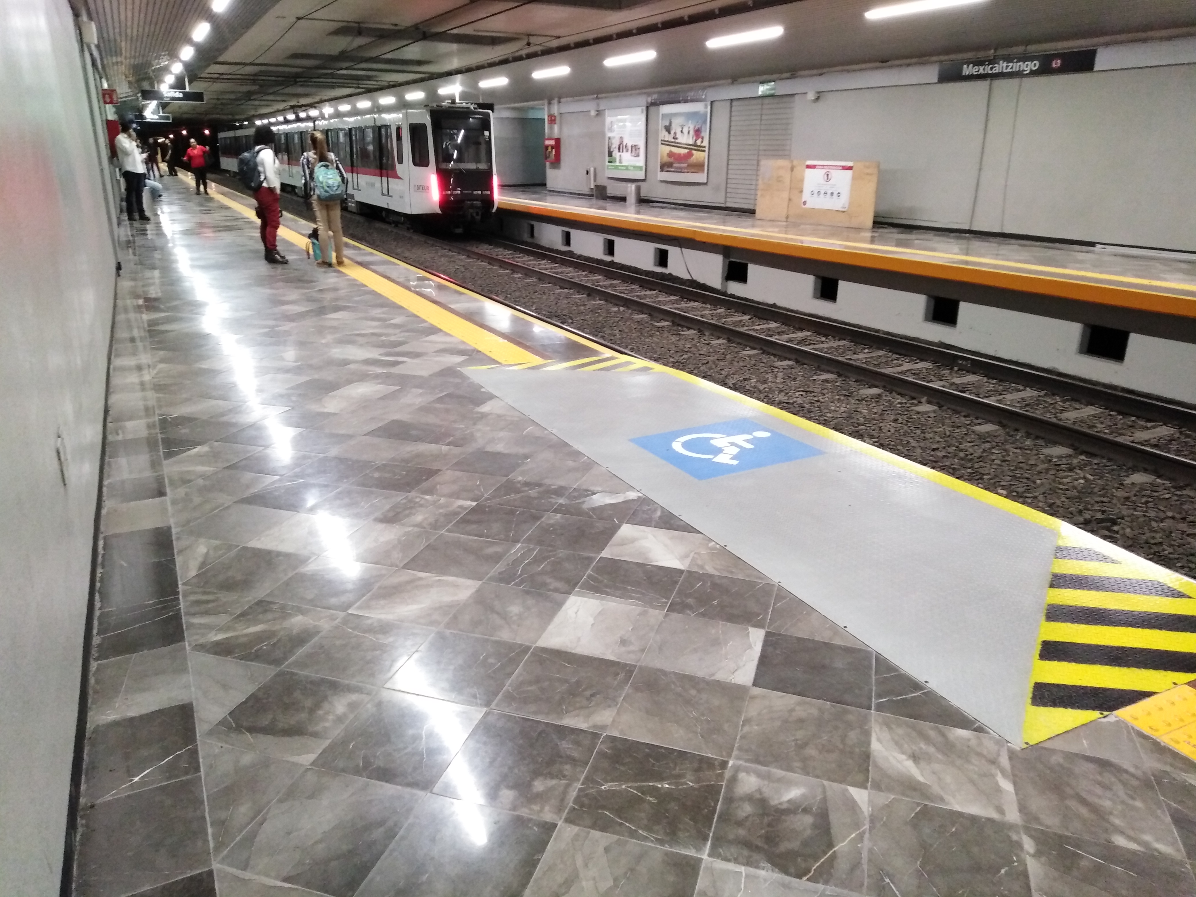 Estacion Mexicaltzingo con tren TEG-15 de fondo